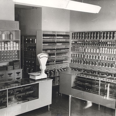 Helsingin Myymälä